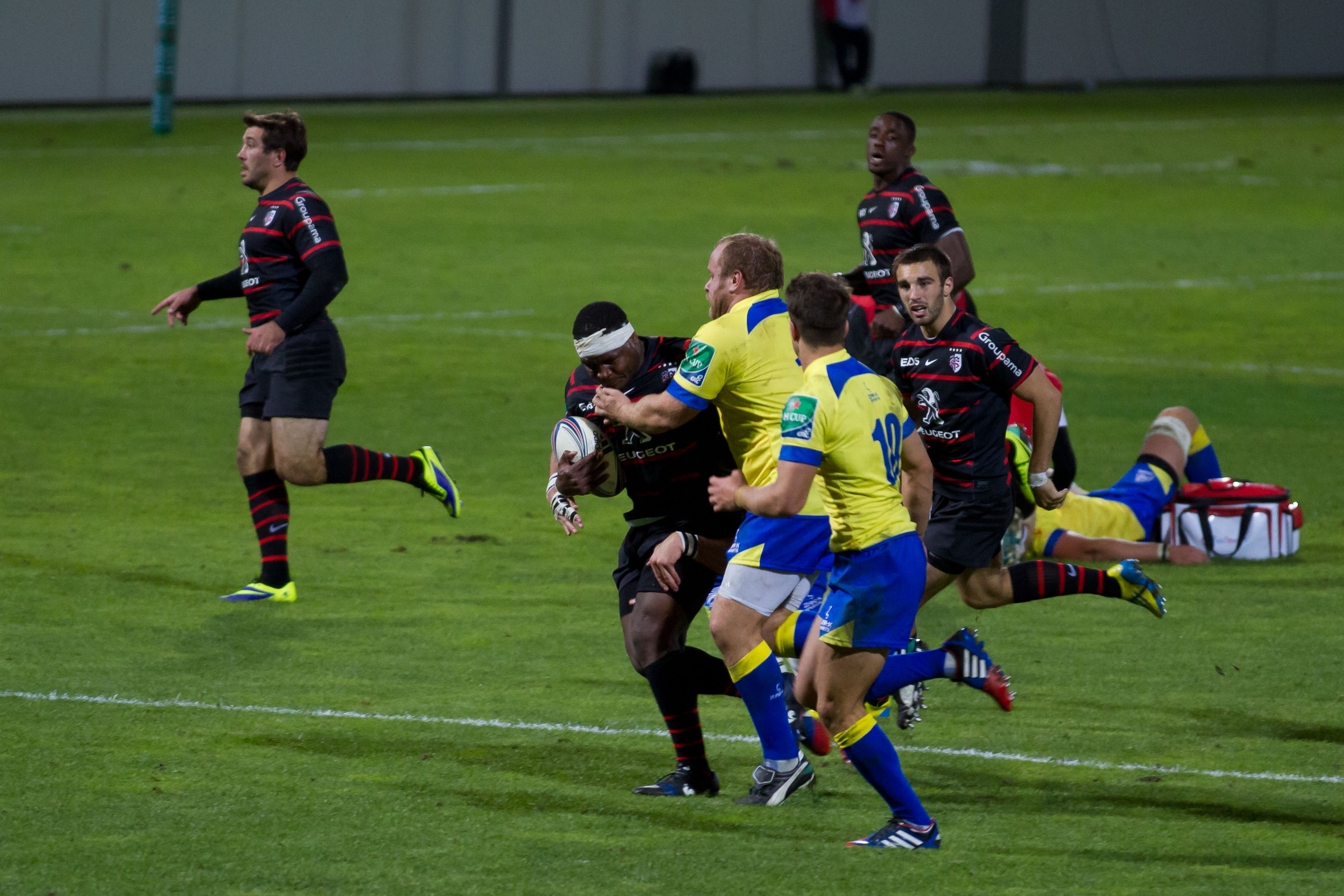 Heineken Cup 2013-14 — 11 October 2013, Stade Ernest-Wallon. Match between: Stade toulousain — Zebre Chiliboy Ralepelle